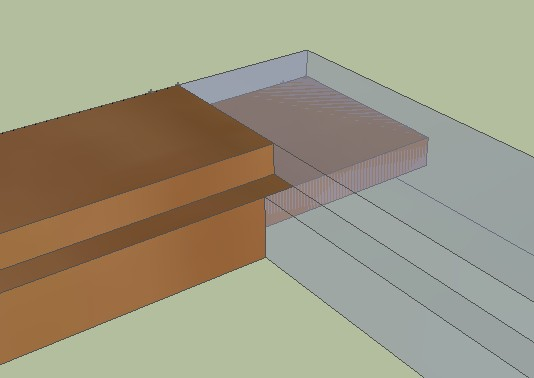 Egyharmad aljazás